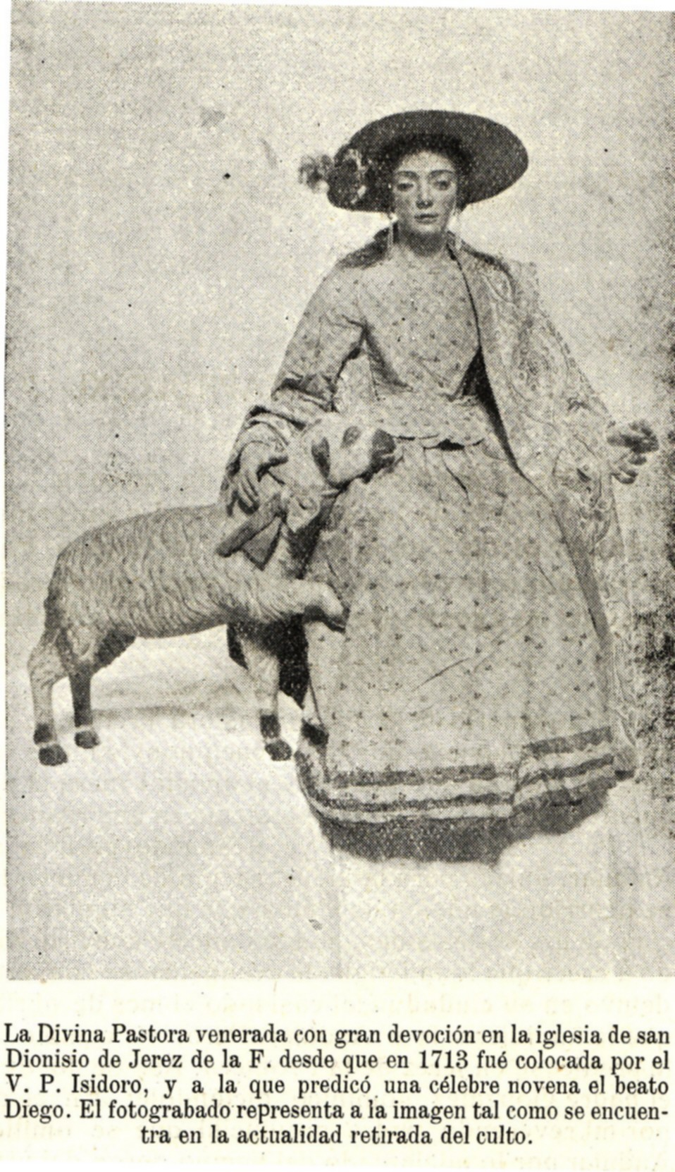 Del libro del Padre Ardales